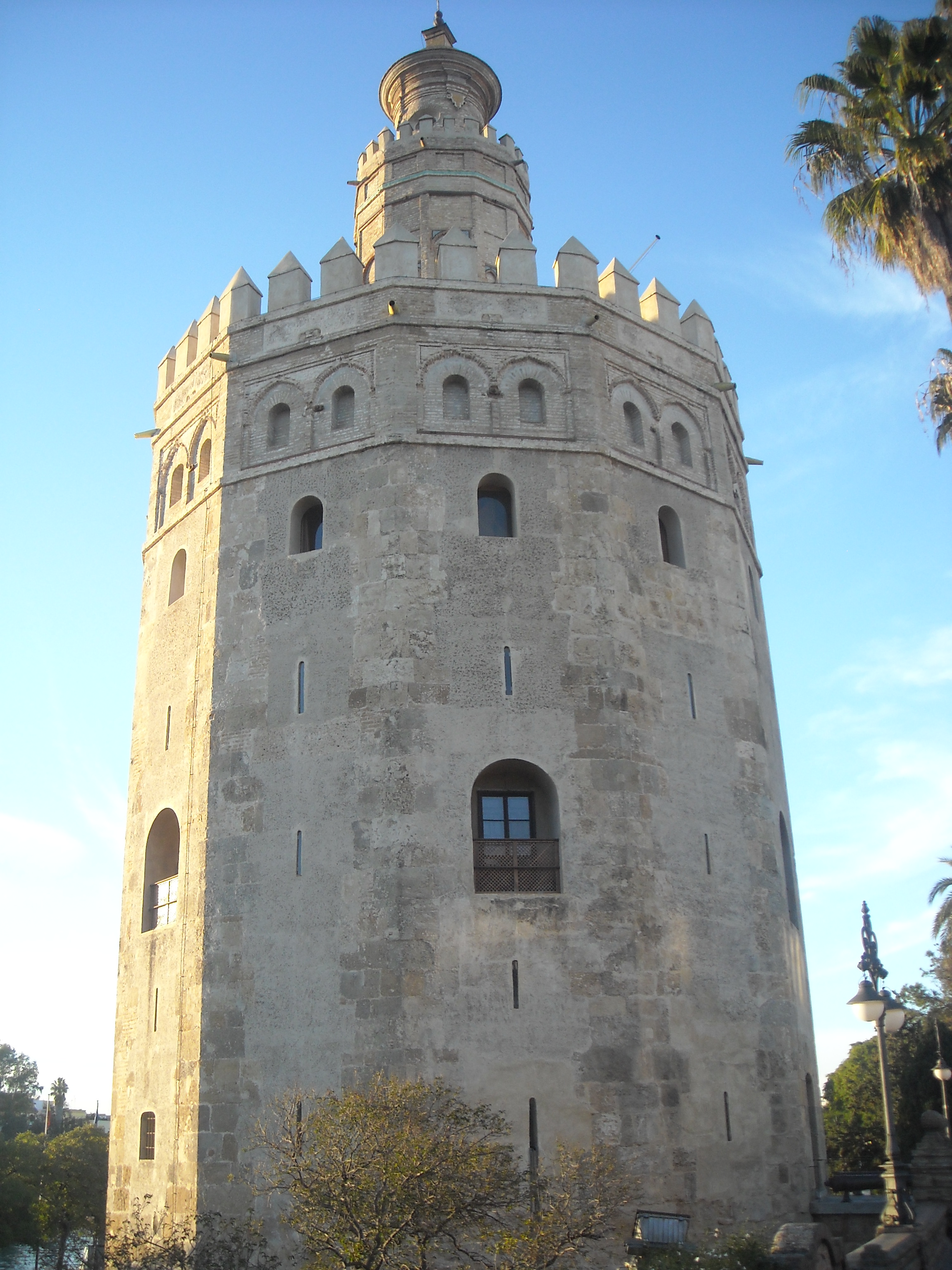 La torre del oro, antigua construcción de Sevilla, en España.